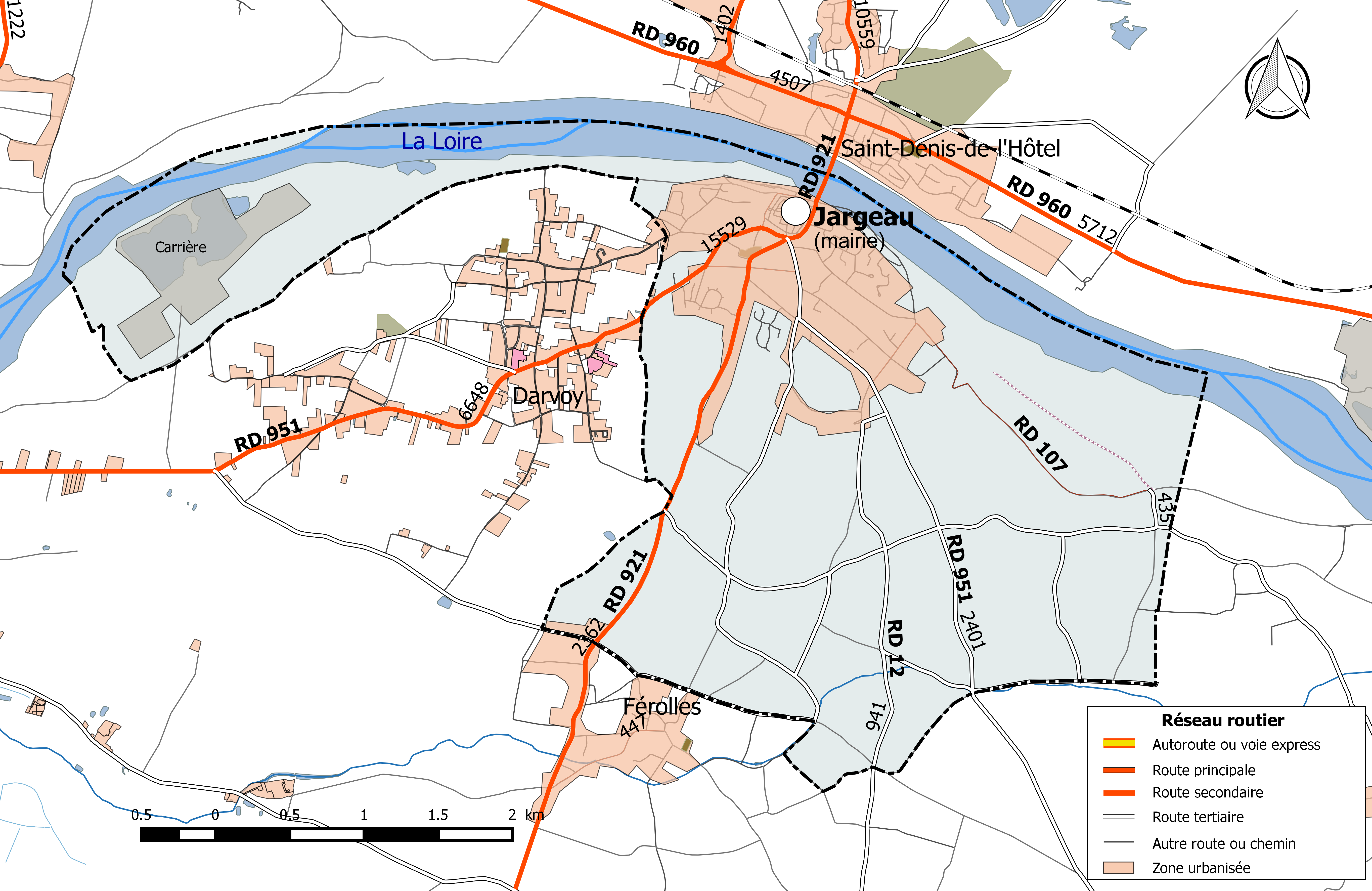 Carte du réseau routier de la commune de Jargeau.